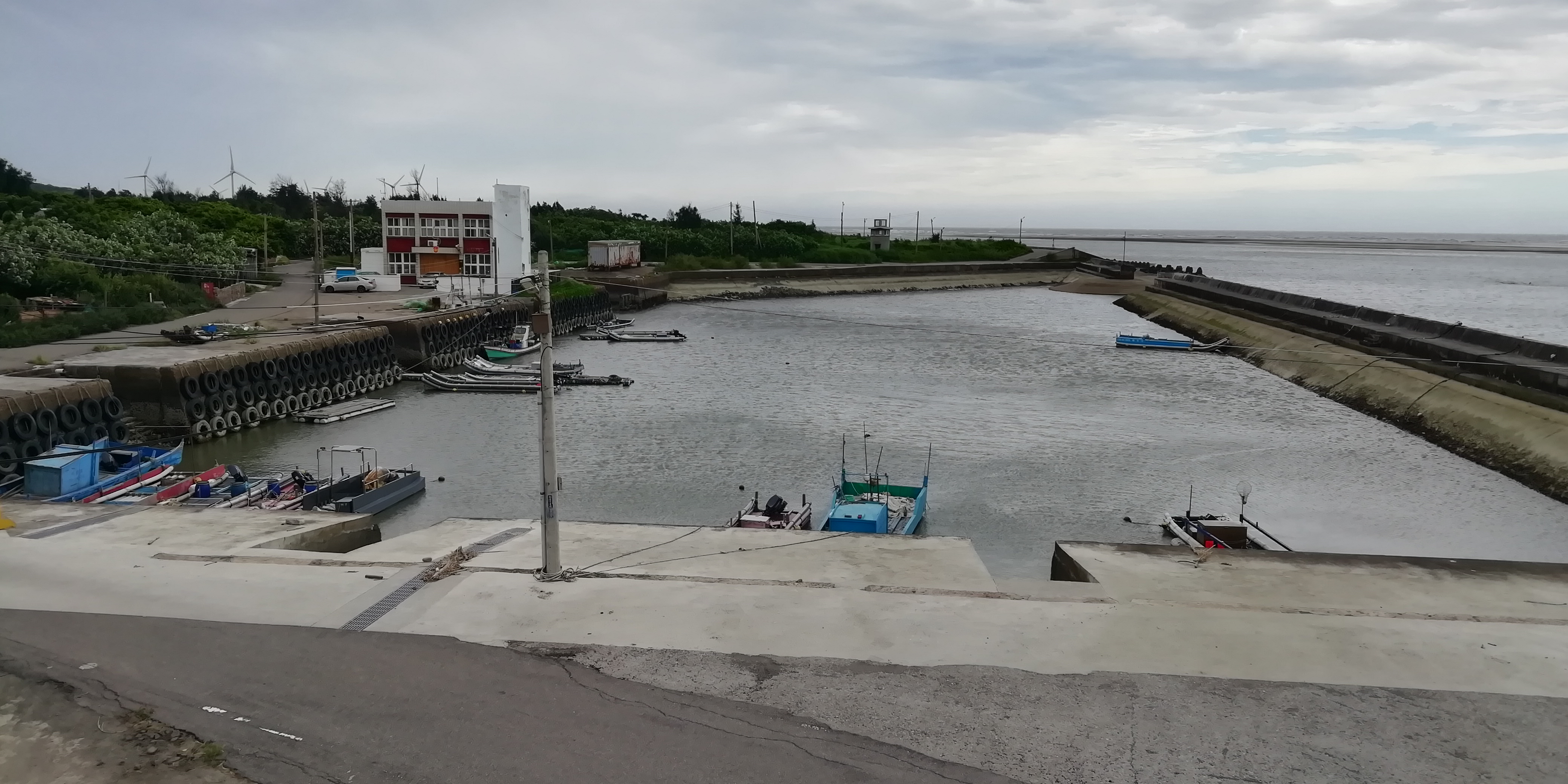 中文（台灣）: 公司寮漁港，位於苗栗縣後龍鎮龍津里，地理位置為後龍溪口之南岸；屬於第二類漁港，為典型河口港。